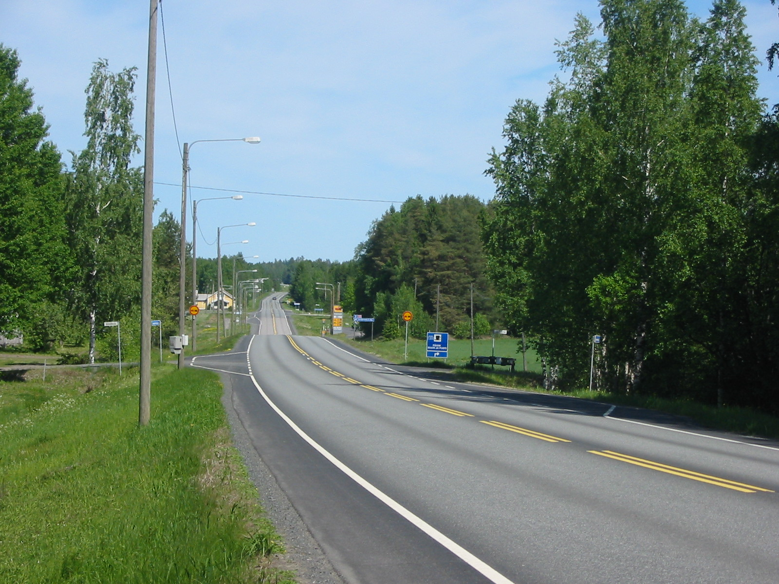 Valtatie 10 Ypäjän Palikkalassa kesäkuussa 2011.